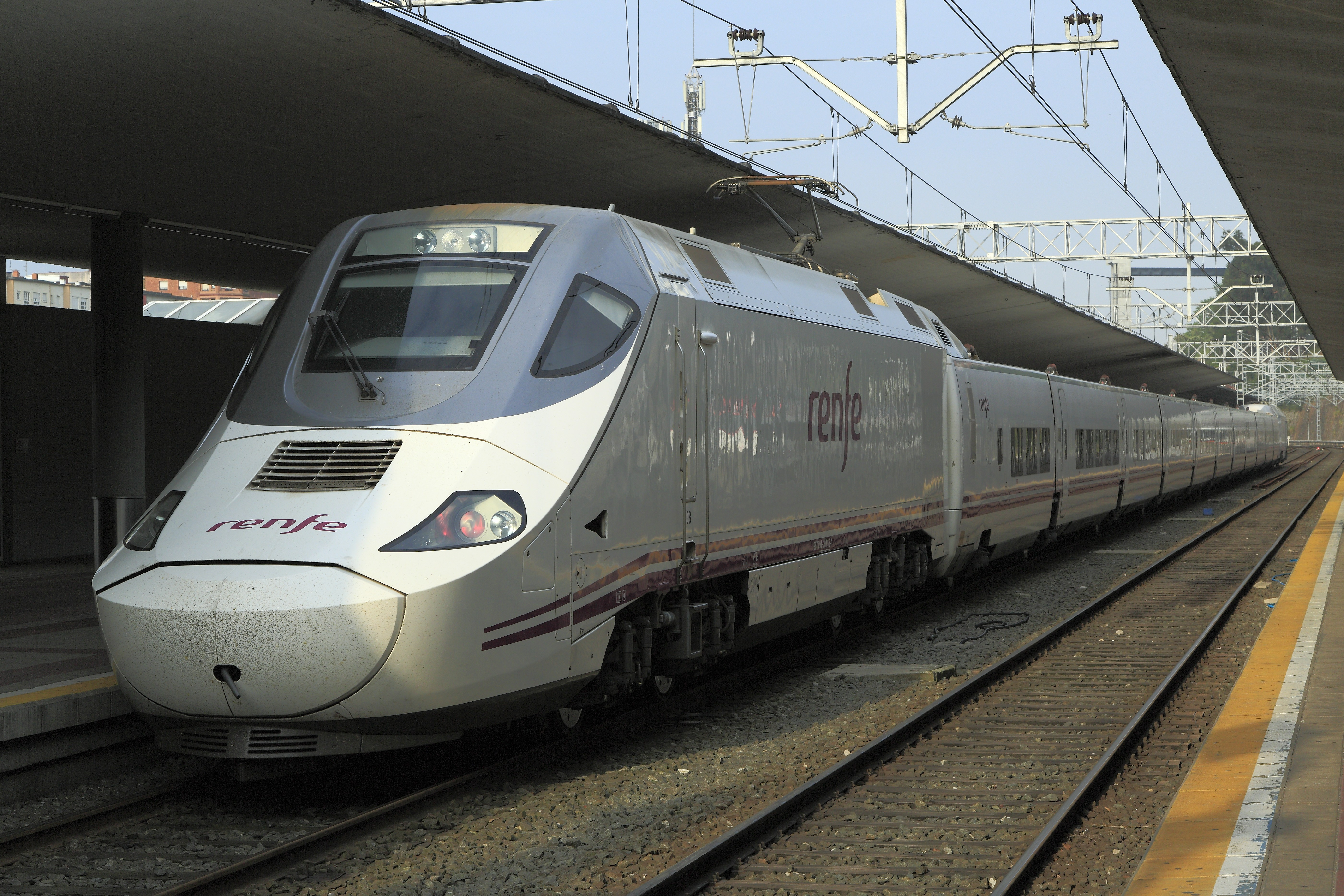 »Alvia« Santander–Alicante, die Maschine wird am Zugschluss laufen. Während der Zugfahrt wird die Einheit dreimal (Valladolid, Madrid Chamartín und Atocha) umgespurt.